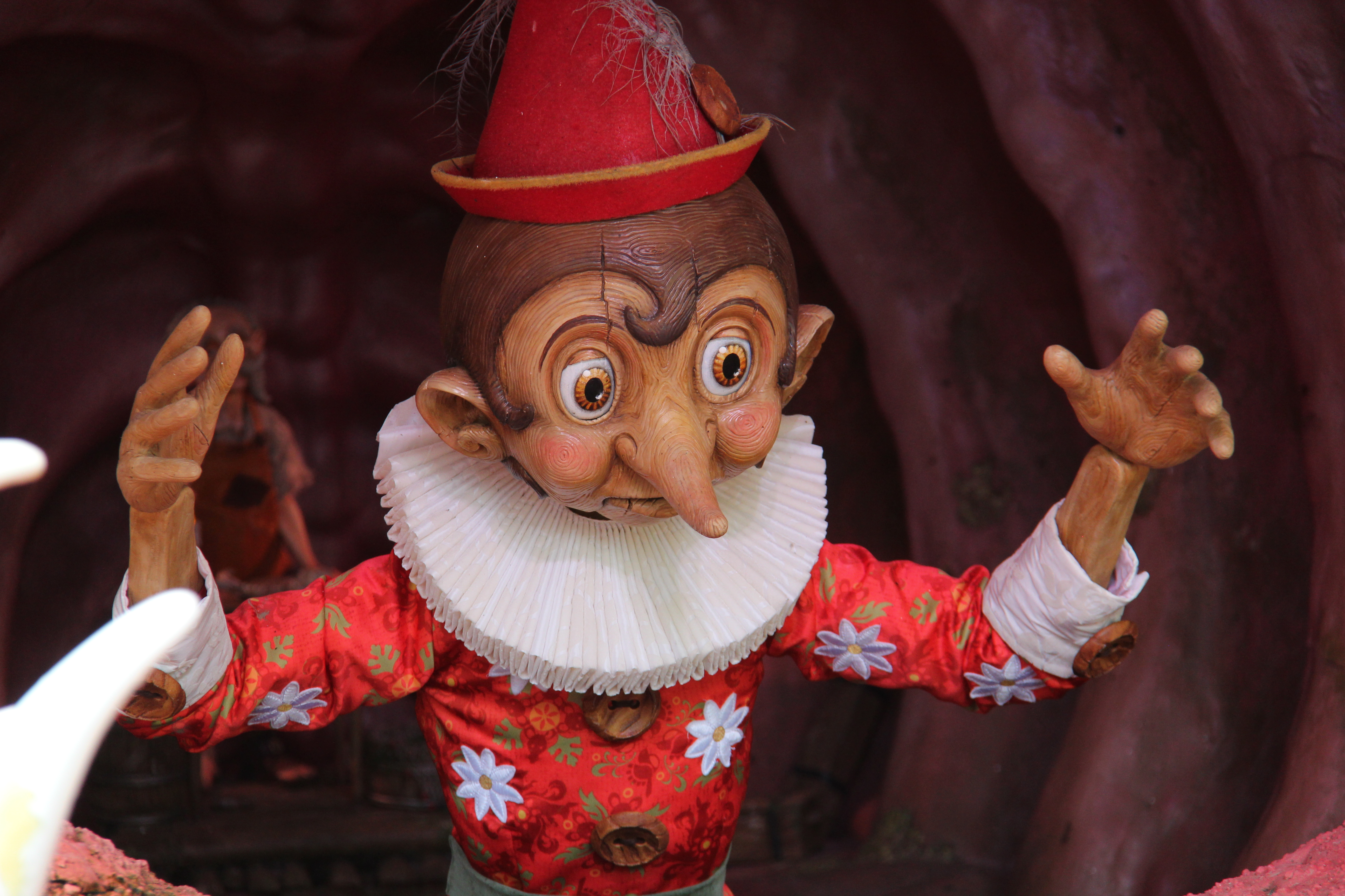 Pinokkio in de Efteling